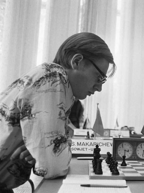 Makarichev (USSR), Amsterdam 1975.